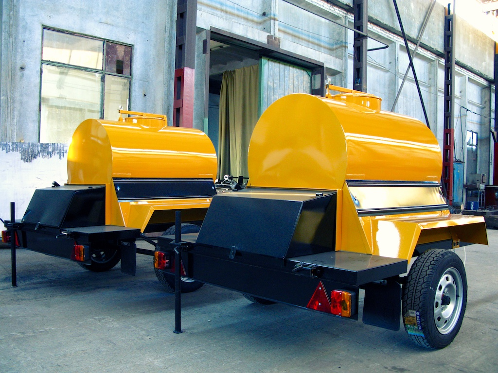 Квасные бочки на заводе Мак-А, г. Волгодонск